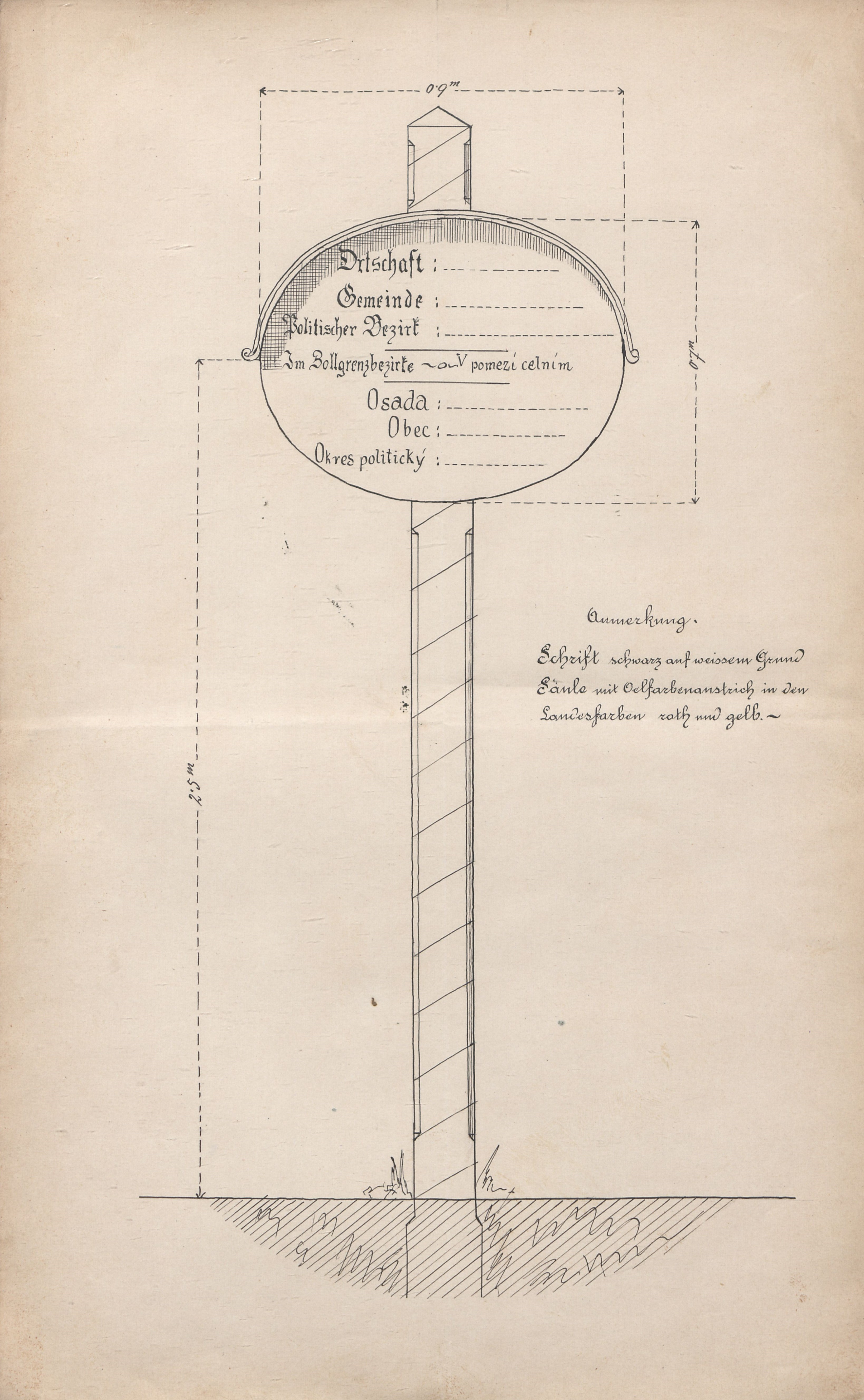 Vzor značky (místní tabule) v souhlasu s výnosem moravského místodržitelství z roku 1876 vydaným na základě § 9 zákona o sčítání lidu z 29. března 1869 (číslo 67 listu říšského zákoníku). 22. dubna 1876, pod č. 9995 byl výnos zaslán všem okresním hejtmanům. Výnos týkající se označení na místních tabulích, jak se takové měly na základě § 9 zákona o sčítání lidu z 29. března 1869 postavit (číslo 67 listu říšského zákoníku): "§. 9 Am Eingange und Ausgange einer jeden Ortschaft soll auf Kosten der Gemeinde eine Tafel (Ortschaftstafel) auf einer angemessenen Stelle angebracht und stets leicht lesbar erhalten werden. Diese Tafel hat den Namen der Ortschaft, dann der Gemeinde und des politischen Bezirkes, zu welchem sie gehört, und bei Ortschaften, welche im Zollgränzbezirke liegen, auch diesen Beisatz zu enthalten. Die politische Landesbehörde bestimmt, in welchen Landessprachen die Aufschriften zu machen sind." Vzor značky: Oválná tabule (cedule) na šířku, o rozměrech 0,9 m (šířka) a 0,7 m (výška) upevněná ve výši 2,5 m na sloupku nad zemí. Ke vzoru připojená poznámka popisující ceduli a sloupek, ke kterému měla být připevněna. Sloupek měl být natřený (olejovými) zemskými barvami, za které byly úřady považovány červená a žlutá. V bílém poli tabule měl být umístěn černý nápis s textovými položkami (nejprve německy, potom česky): Ortschaft: Gemeinde: Politischer Bezirk: Im Zollgrenzbezirke / V pomezí celním Osada: Obec: Okres politický: "Anmerkung: Schrift schwarz auf weissem Grund Säule mit Oelfarbenanstrich in den Landesfarben roth und gelb." MZA v Brně, fond A 9 Zemský výbor, karton č. 187